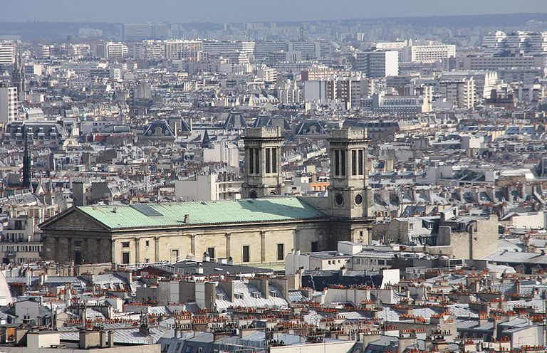 Paris - église Saint-Vincent de Paul - view from Parvis du Sacre Coeur (Montmartre)